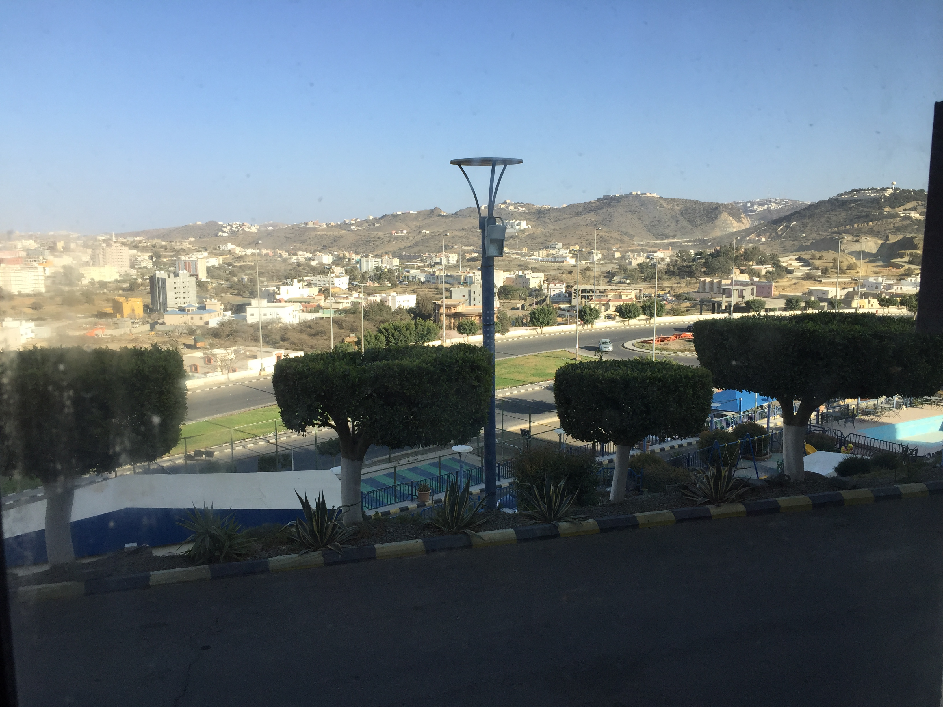 مدينة الباحة السعودية